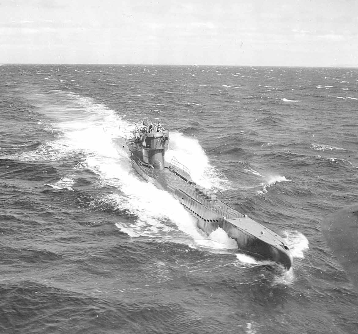 U-278